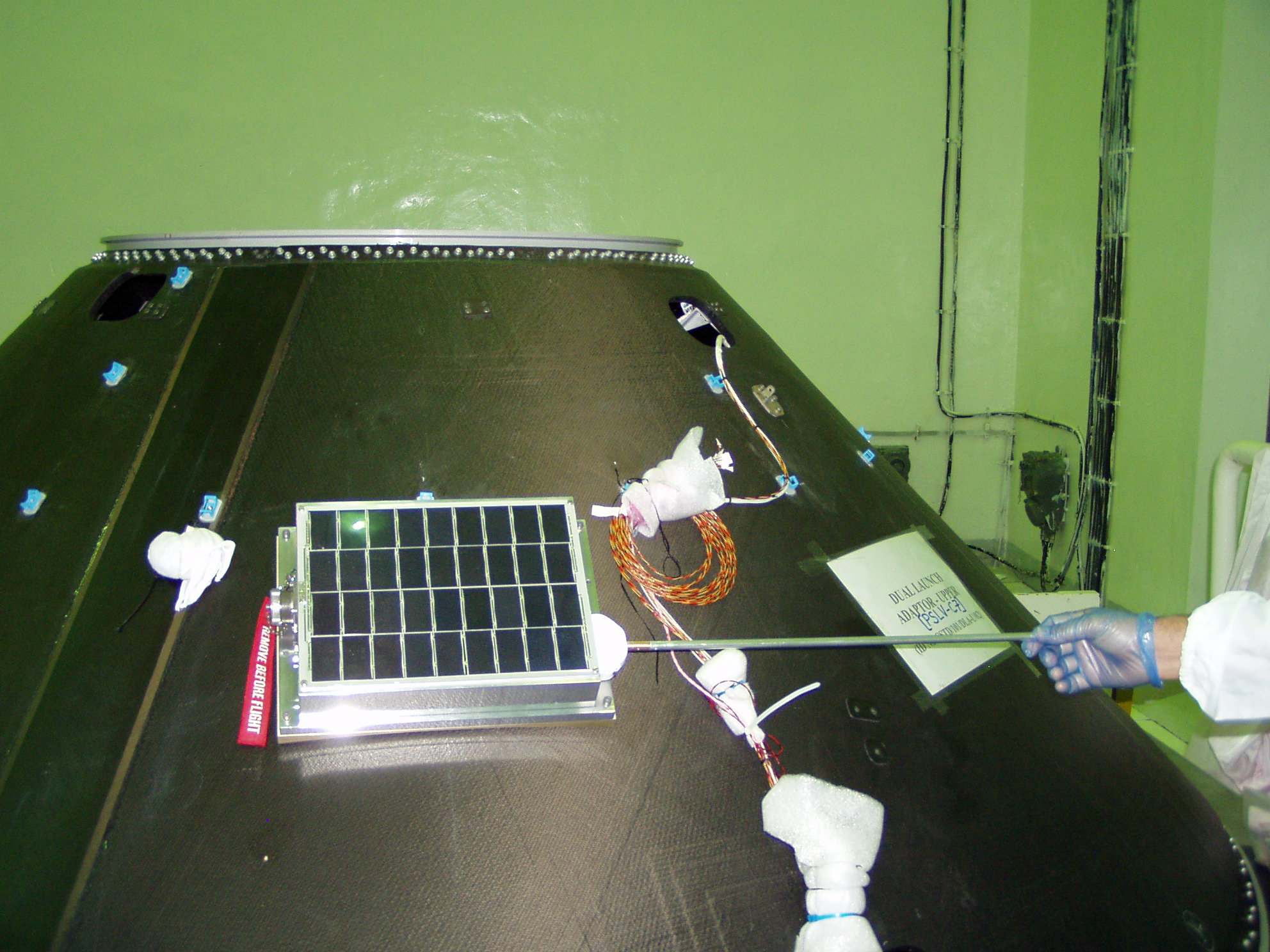 Pehuensat-1, satelite argentino. En la imagen ya se lo ve unido al lanzador.